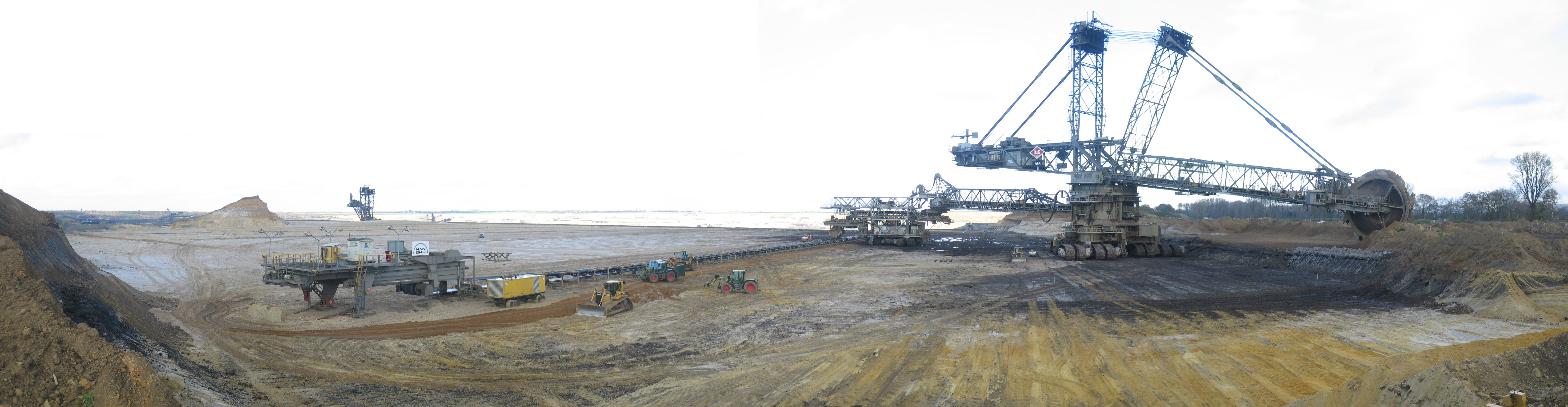 Graafwielbagger 255 van RWE in dagbouwmijn Inden, Duitsland. De graafwielbagger is bezig op de plaats waar het voormalige dorp Inden stond de toplaag weg te halen zodat de bruinkoollaag bloot komt te liggen. Deze bagger meet ongeveer 75 meter hoog en 150 meter lang. De grootste baggers meten 96 meter hoog en 240 meter lang. Foto's genomen op 6 november 2005 door Tijmen Stam, vervolgens aan elkaar geplakt met Hugin en Enblend.